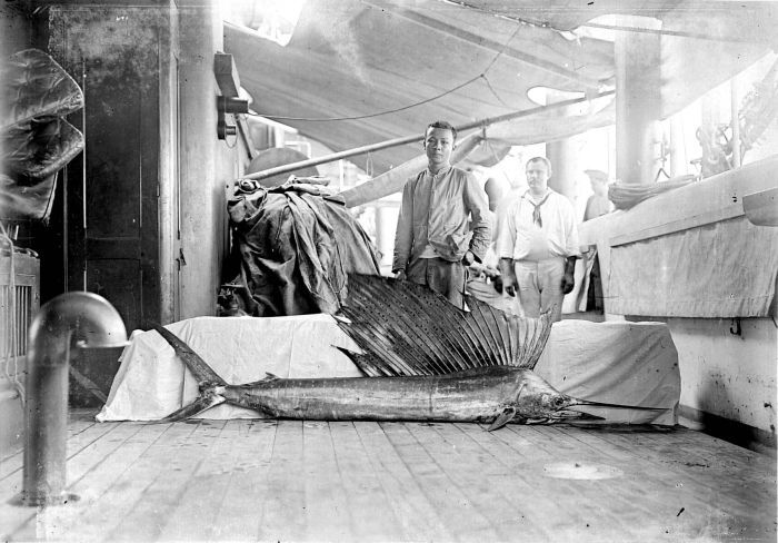 Repronegatief. De zeilvissen (Histiophorus orientalis) ontlenen hun naam aan hun voorste 'stekelstralige' rugvin. Net als de verwante zwaardvissen hebben ze een zwaardvormig verlengde bovenkaak. Het zijn bewoners van de wijde wereldzeeën. Als er nu één eilandengroep in de Archipel ligt die als het ware verdrinkt in een grenzeloze zee dan is het wel de Banda Archipel bestaande uit een paar nietige eilandjes (het gebied werd dan ook gebruikt als verbanningsoord van Indonesische nationalisten). De vis op de foto is daar gevangen door de 'Siboga' expeditie (1899-1900) die onder leiding stond van de bioloog Max Weber (de andere Max Weber). Hij exploreerde de zeeën van het oostelijk deel van de Archipel. (P. Boomgaard, 2001). Zwaardvis gevangen aan boord van het schip H.M. Siboga te Banda